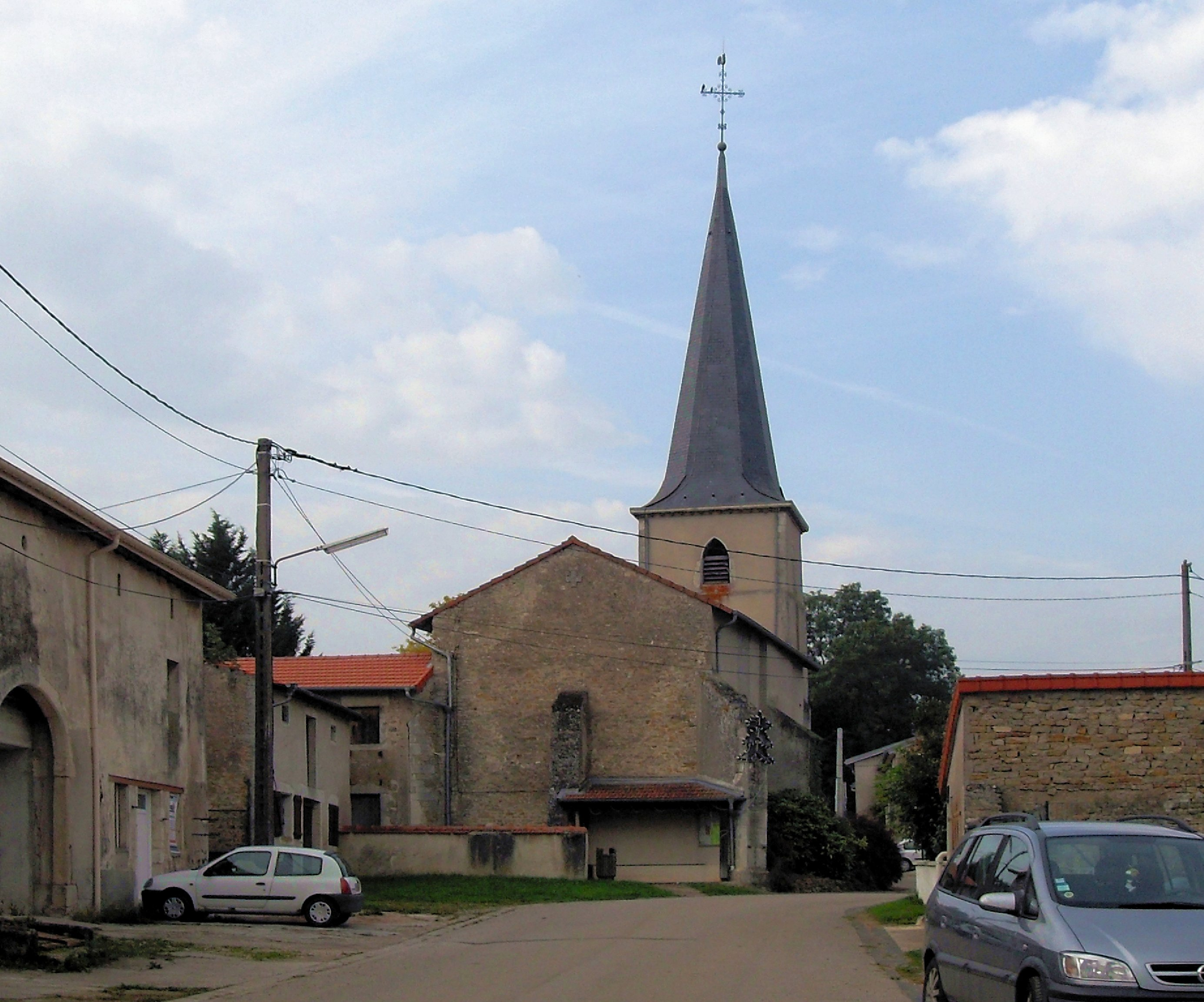 L'église Saint-Élophe à Clérey-sur-Brenon